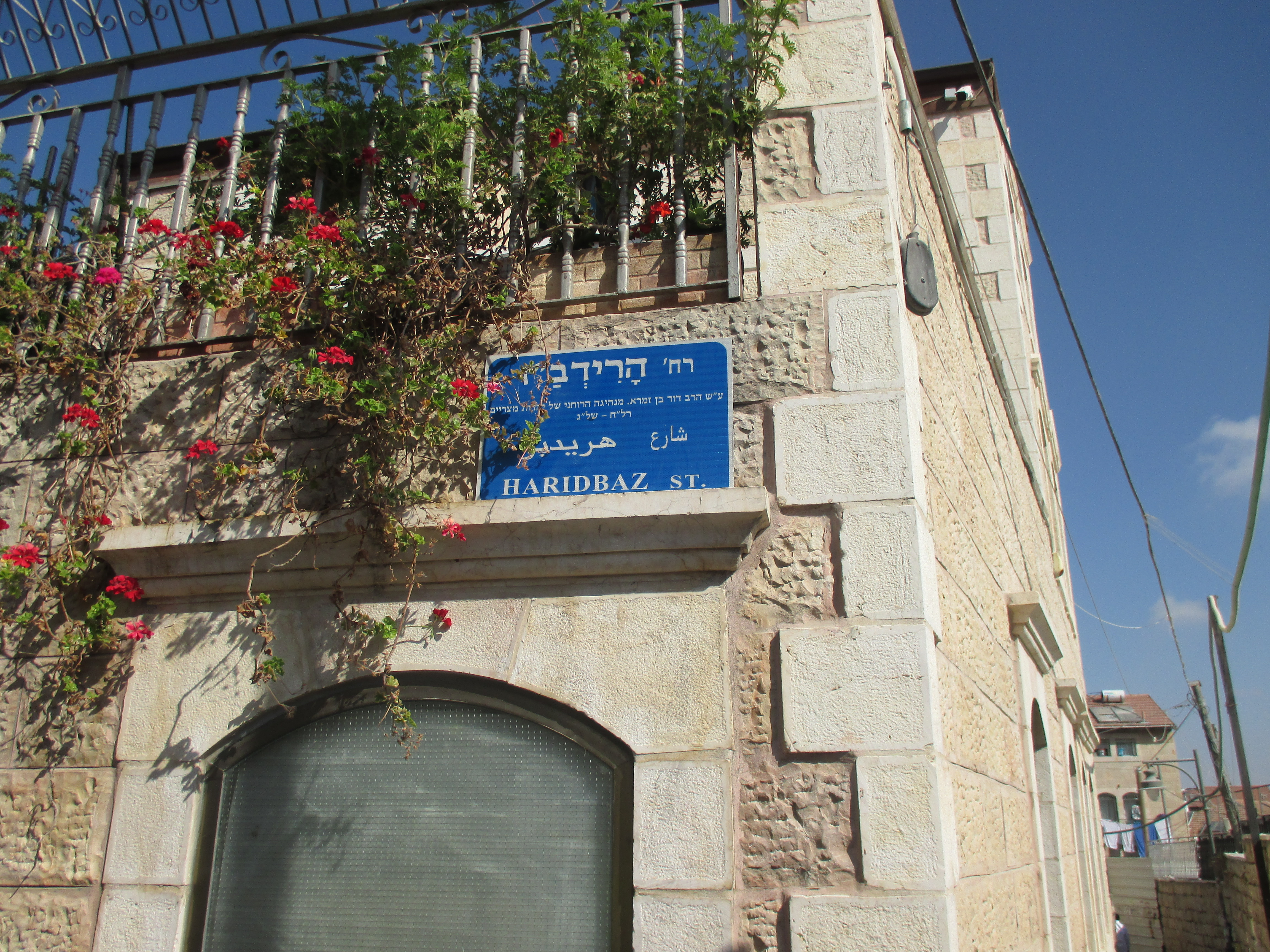 שלט רחוב בירושלים על שם הרדבז